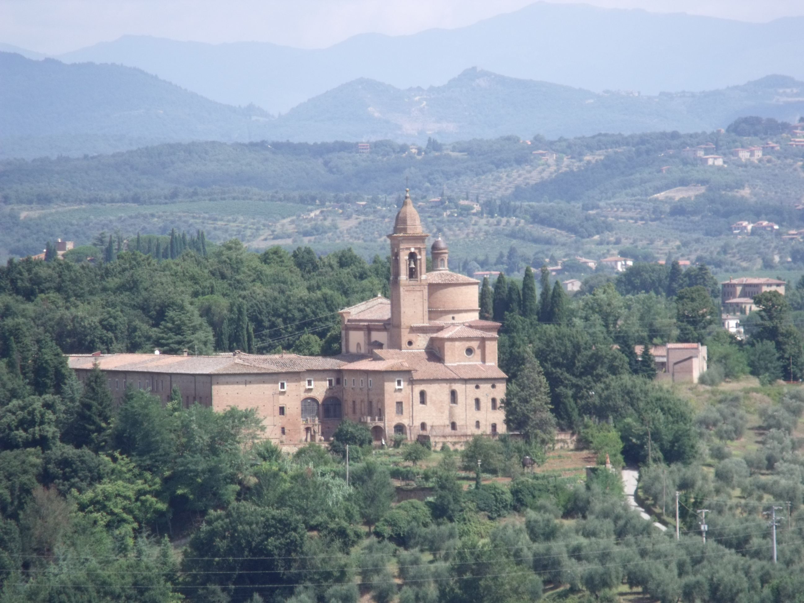 Die Basilica dell’Osservanza in Siena vom Turm des Palazzo Salimbeni aus gesehen